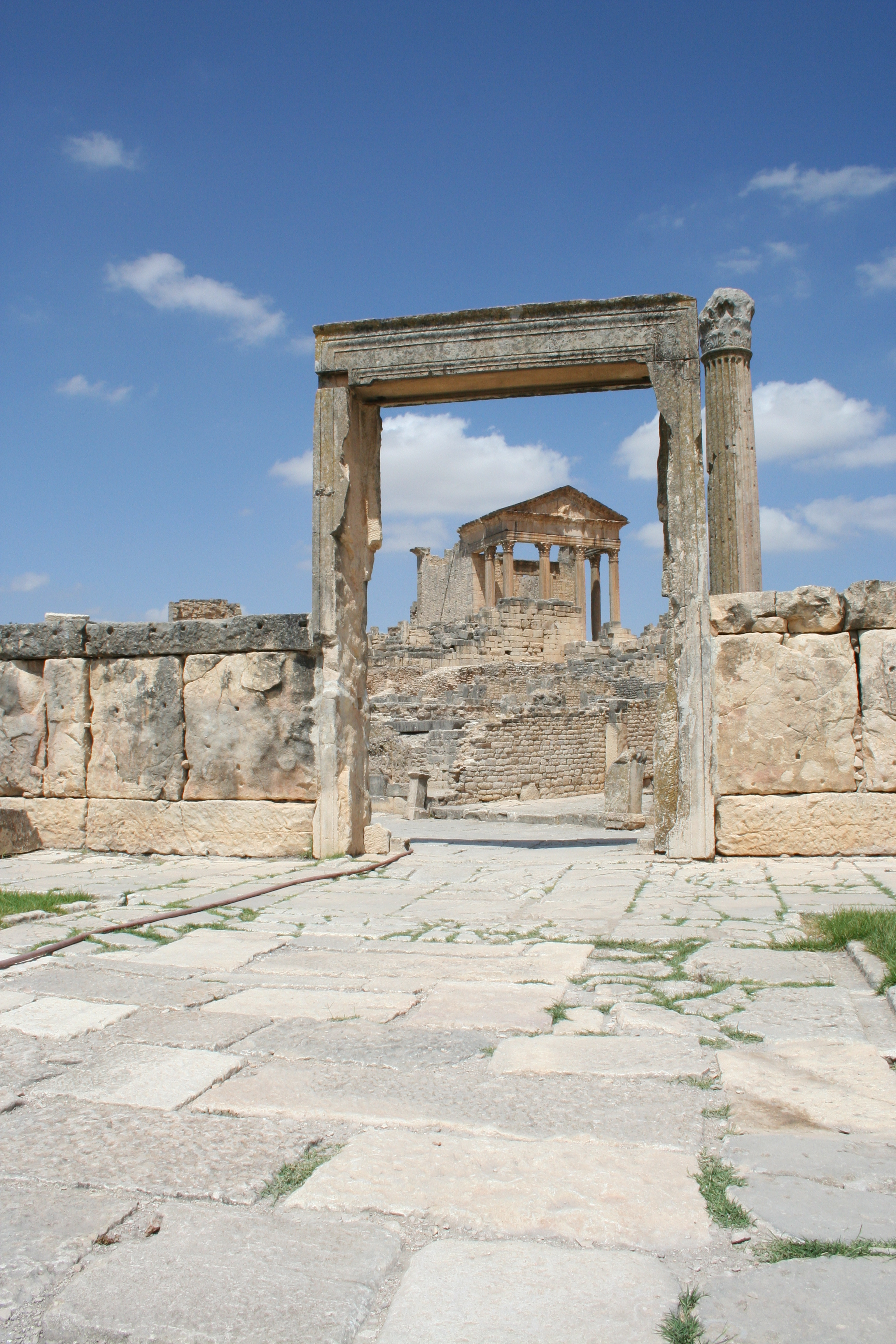 Dar Lachheb vers Capitole, Dougga